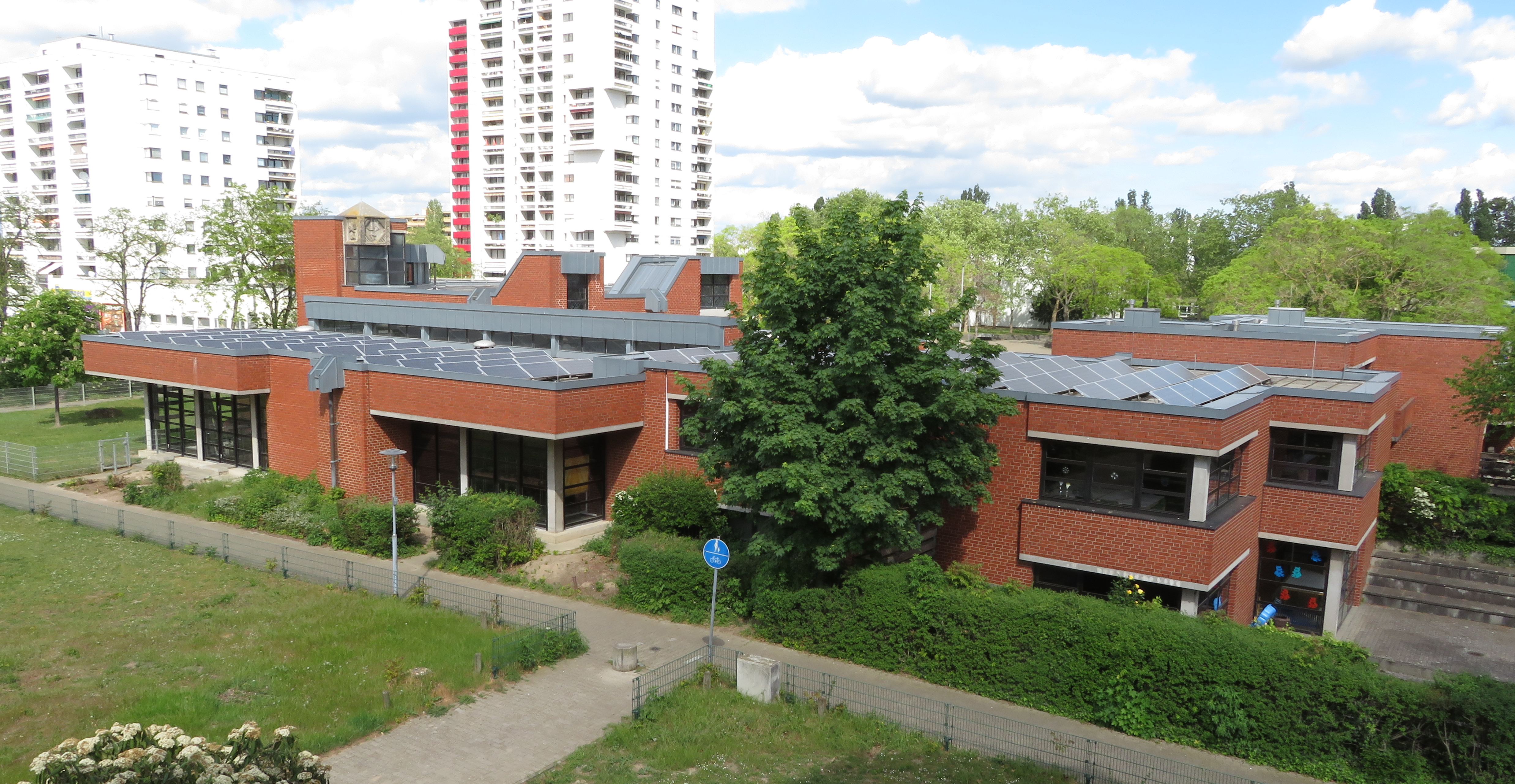 Rückansicht eines ökumenischen Gemeindezentrums in Rheinland Pfalz mit integriertem modernen Kirchengebäude und Solaranlage auf dem Flachdach des Gemeindehauses